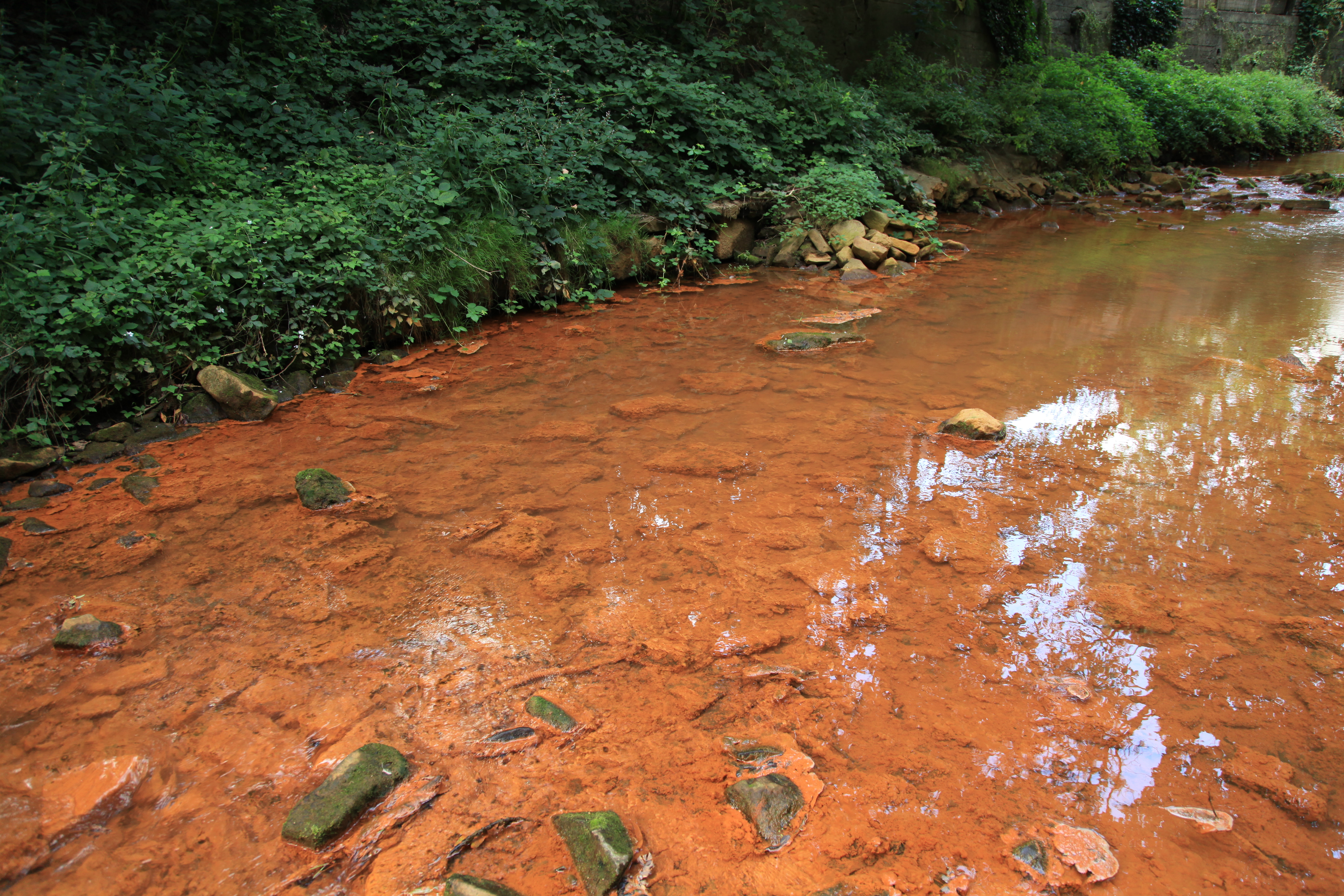 Grubenwasser aus dem Franziska Erbstollen, Ruhrdeich in Witten